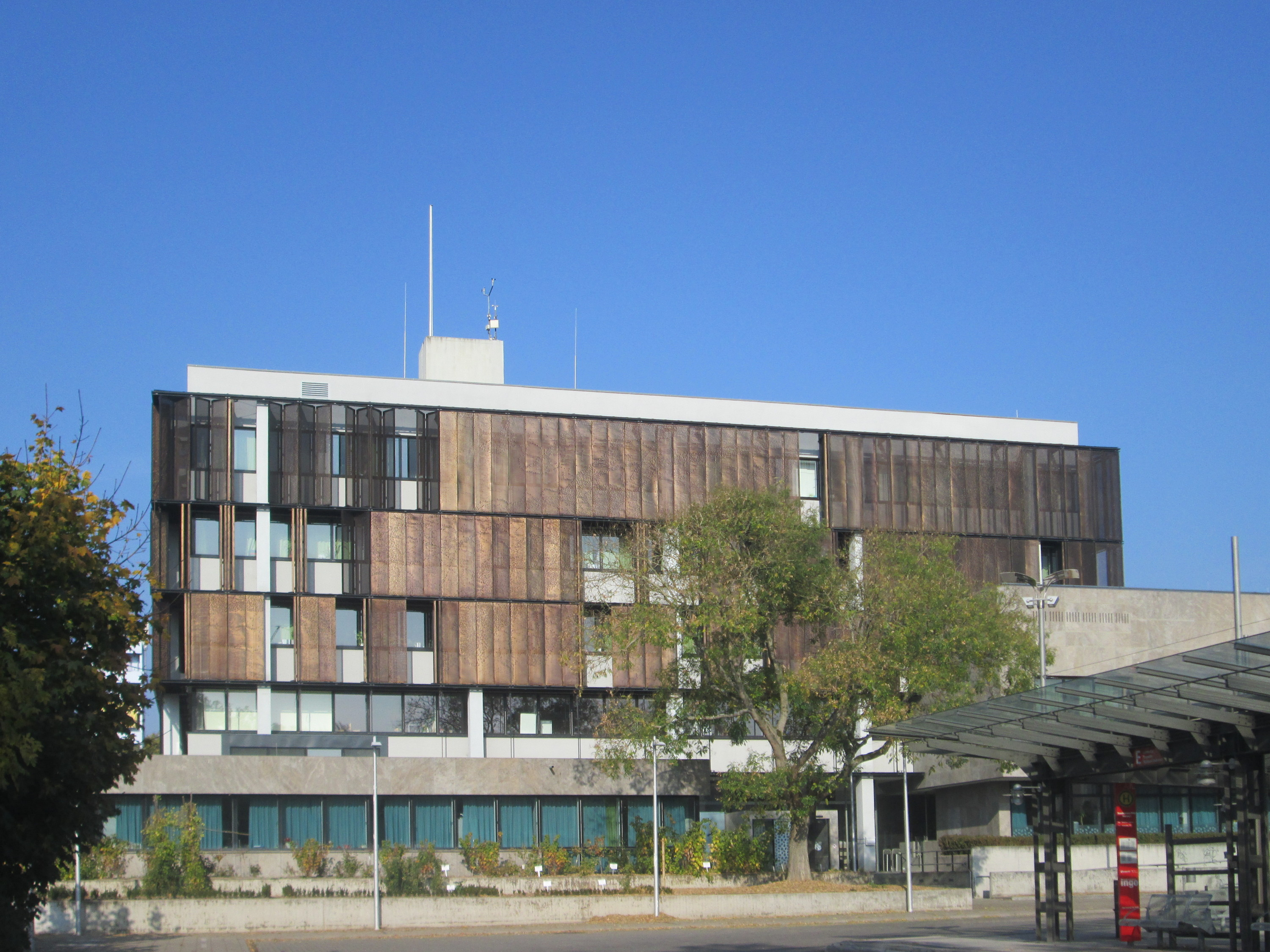 Rathaus St. Ingbert, erbaut 1971-1972, Neugestaltung 2005-2009